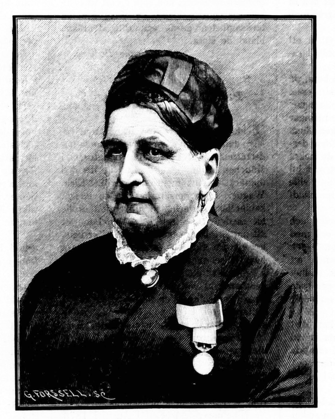 Hanna Brooman (1809-1887)